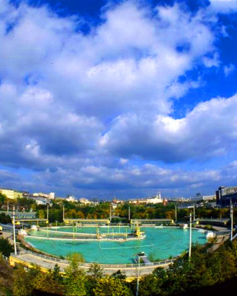 Бассейн "Москва" в 1980 году, сегодня на его месте возвышается величественный Храм Христа Спасителя, м.Кропоткинская. Moscow, Russia